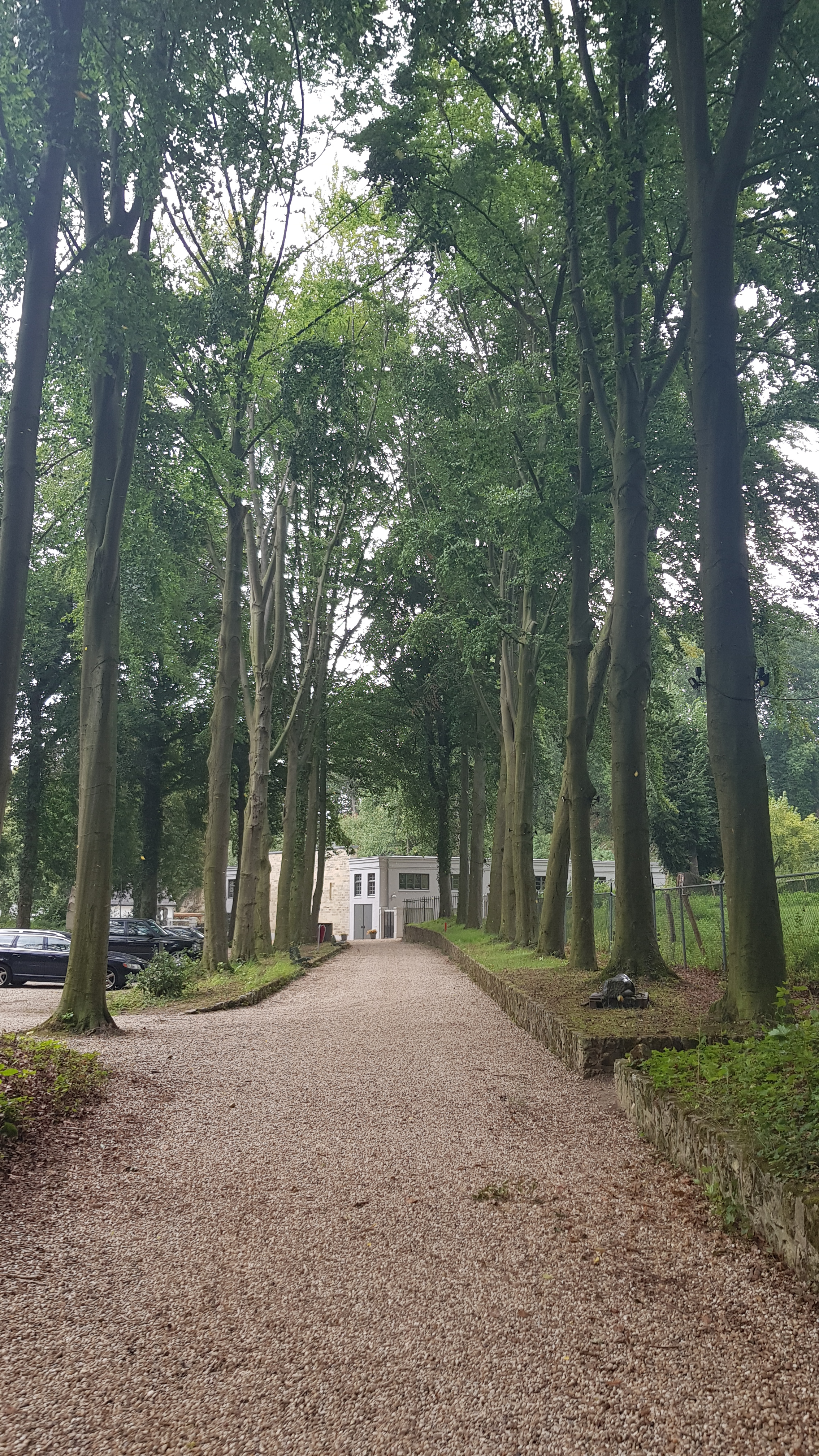 laan Landgoed Heerdeberg, Cadier en Keer, Nederland